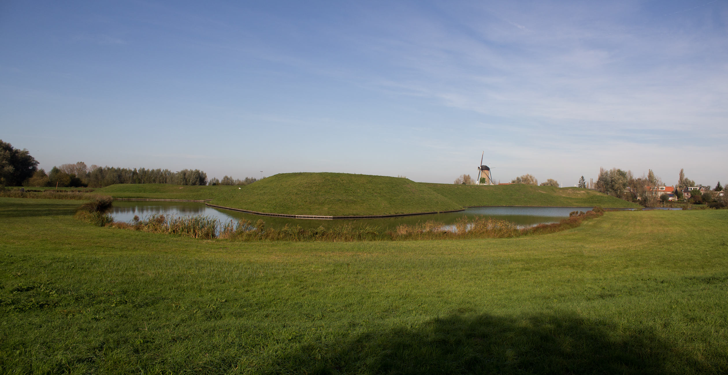 Terheijden, Kleine Schans gelegen nabij de haven van Terheijden en het voetveer van Terheijden